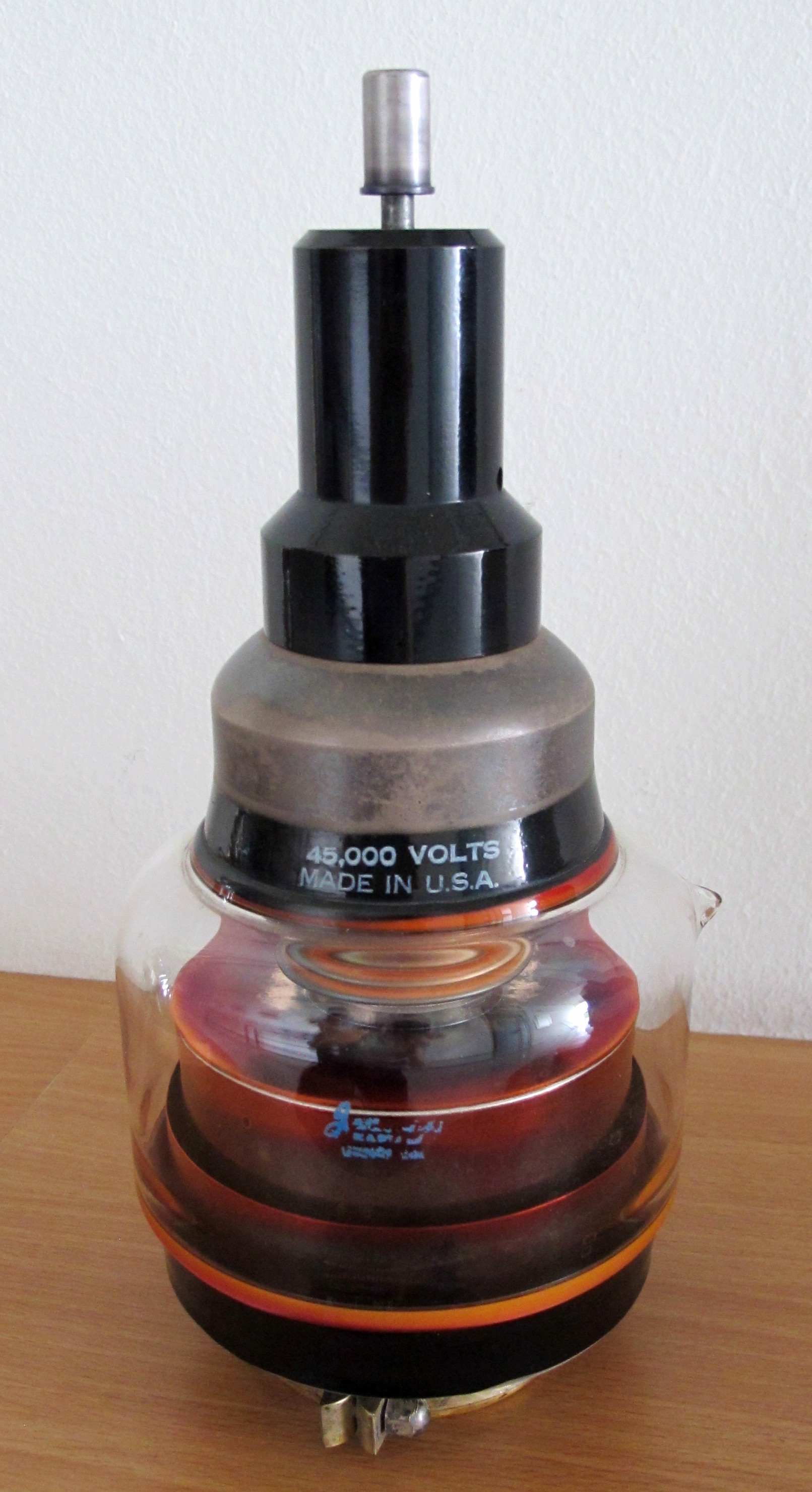 Variabler Vakuumkondensator von 10 pF bis 200 pF. Betriebsspannung: 40 kV Maximale Wechselstrombelastung: 60 Aeff